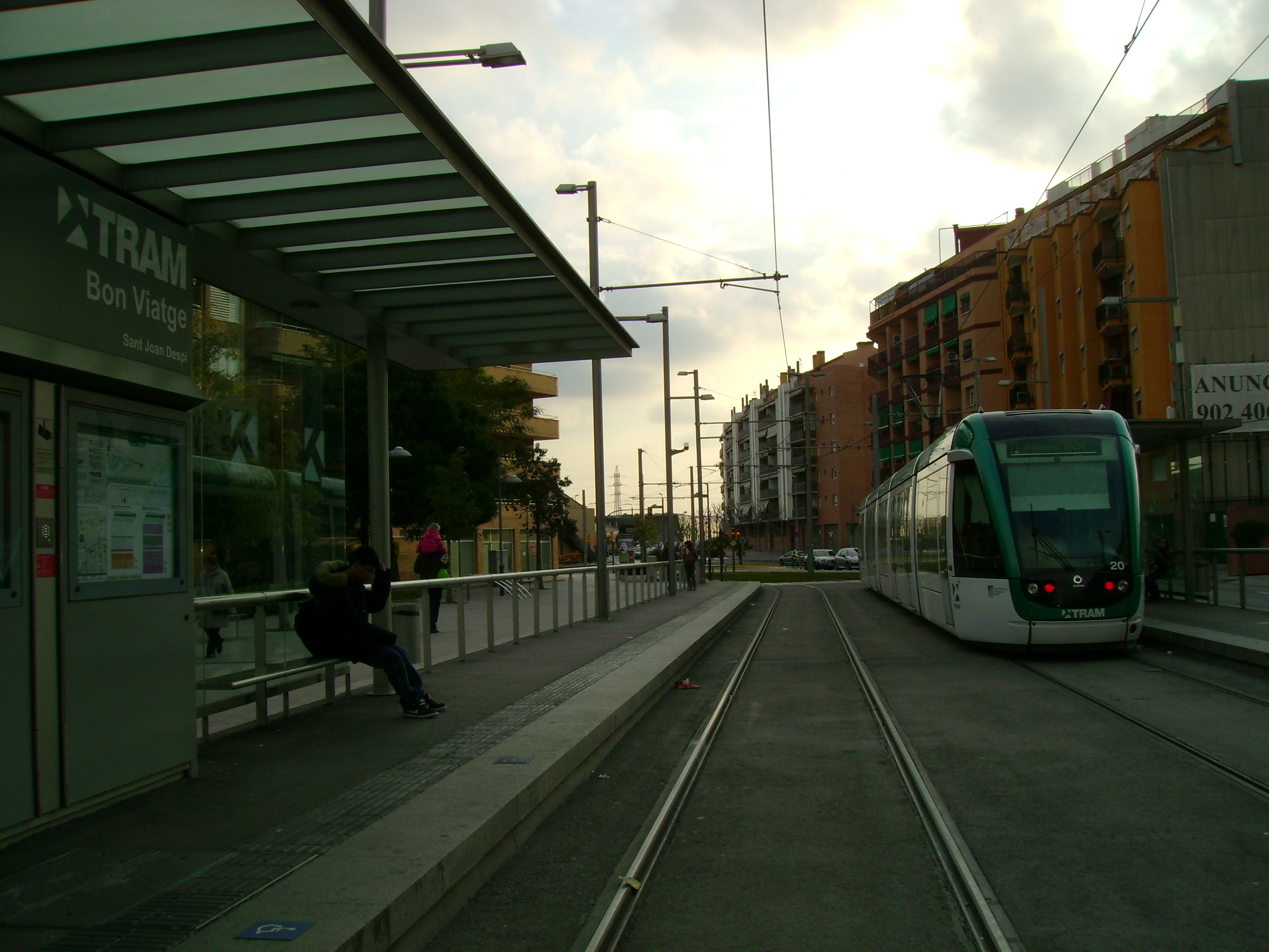 Foto capturada per la meva càmara a l'estació de Bon Viatge (Trambaix).